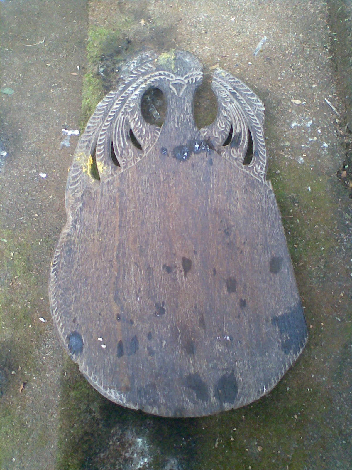 ആവണപ്പലകയുടെ ചിത്രം....ചിത്രശാലയിൽ ഉപയോഗിക്കുവാൻ